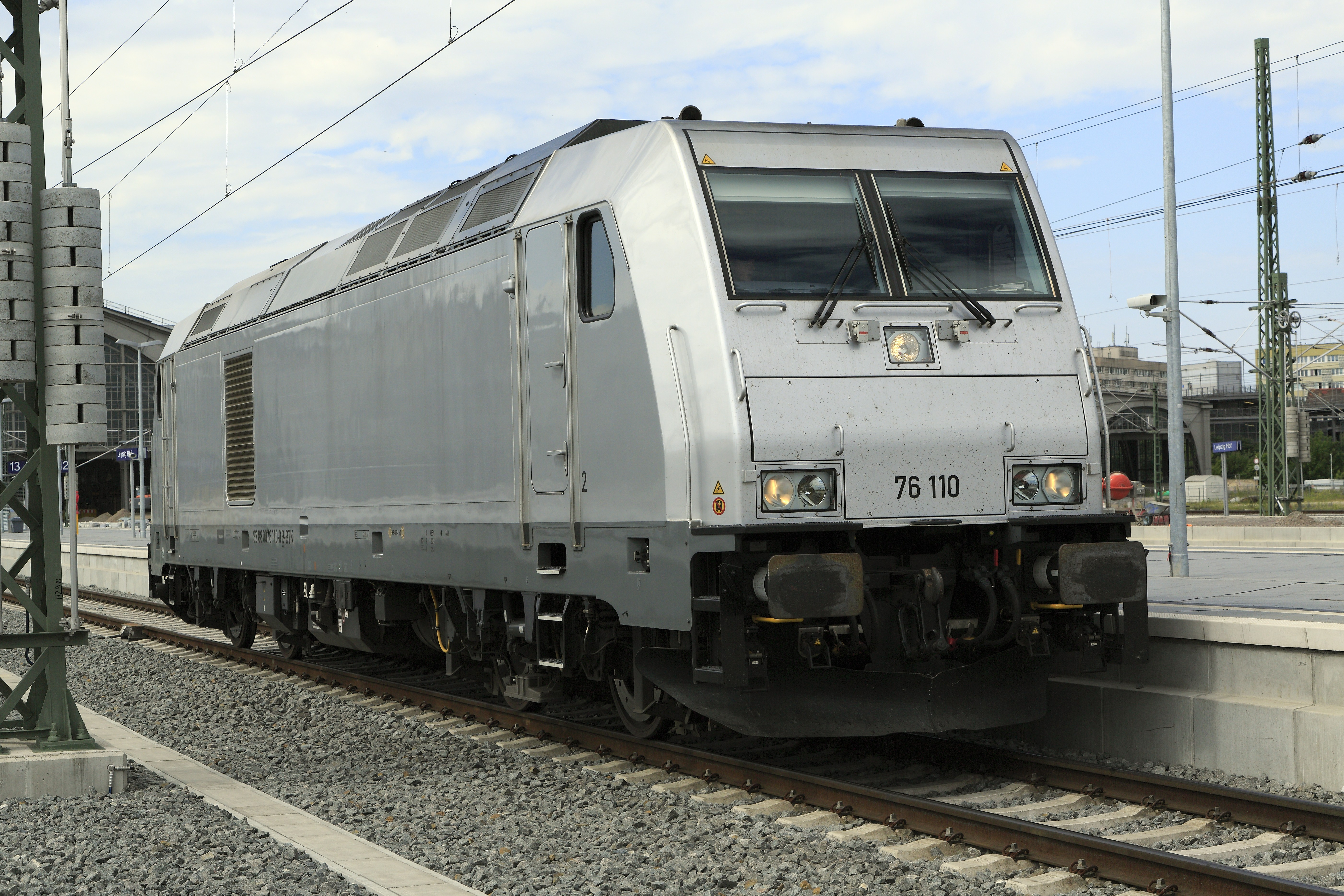 TRAXX F140-DE, die Diesellokomotive ist mit der vollständigen UIC-Nummer 92 88 0076 110 in Belgien zugelassen und wird im Sommer 2015 für Arbeitszüge im Bahnhof Leipzig Hbf eingesetzt. Bahnsteiggleis 13.Diese und weitere Lokomotiven waren für einen belgischen Besteller gefertigt und deswegen dort eingestellt worden. Sie wurden jedoch nicht abgenommen und blieben mit belgischen Nummern in Deutschland.